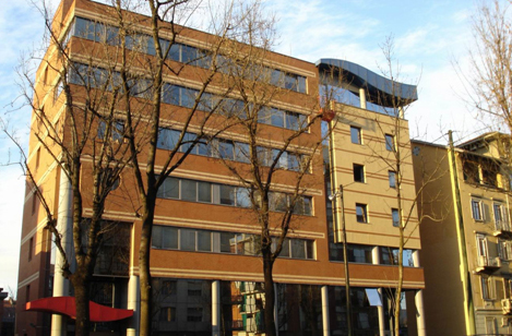 La sede del Centro Estero per l'Internazionalizzazione S.c.p.a. (Ceipiemonte) in corso Regio Parco 27 a Torino.